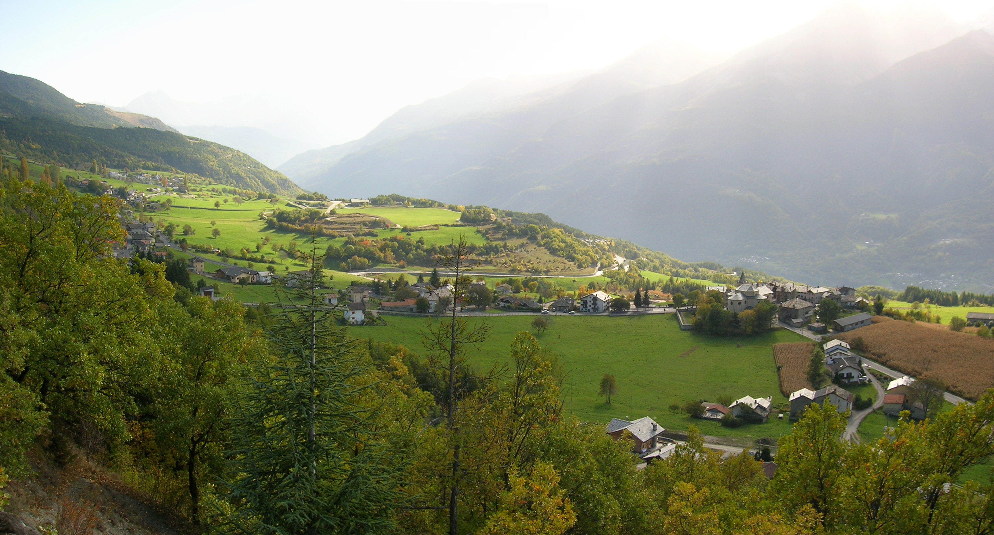 Panorama di Verrayes , Valle d'Aosta, Italia.